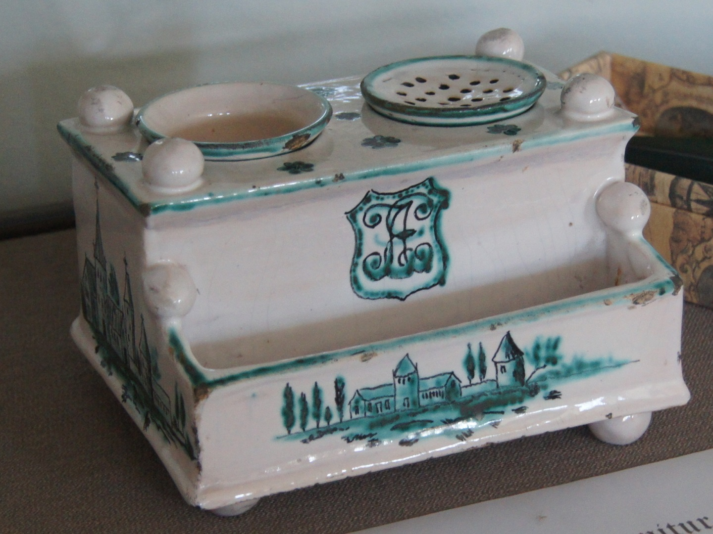 Dirmsteiner Fayence Schreibgarnitur (um/nach 1780)